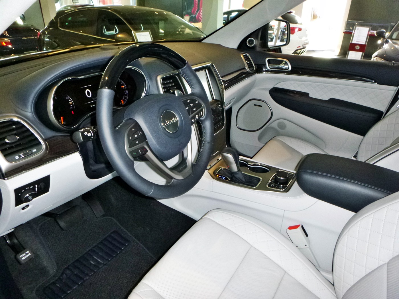 Jeep Grand Cherokee Summit MY2017 Laguna Interieur